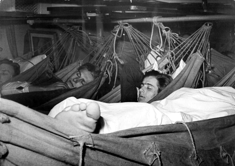 Segelschulschiff "Wilhelm Pieck", Besatzung Zentralbild-Sturm 27.12.1951 Segelschulschiff "Wilhelm Pieck" Die zukünftigen Kapitäne, Steuerleute und Maate unserer Handelsflotte werden auf der schmucken Zweimaster-Schonerbrigg "Wilhelm Pieck" in einem 10-wöchigen Lehrgang ausgebildet. Die Schüler, die aus allen Teilen der DDR kommen und der Interessengemeinschaft für Wassersport der Freien Deutschen Jugend angehören, lernen unter Anleitung des erfahrenen Kapitäns Weitendorf, der vier Offiziere und einer 10-köpfigen Stammannschaft mit grosser Begeisterung die Bedienung des Segelschiffes. Sie wissen, dass der Tag eines einheitlichen Deutschlands nicht mehr fern ist und freuen sich darauf, mit unseren Handelsschiffen alle Meere befahren zu können. Was sie gelernt haben, werden sie dann erst richtig beweisen können. UBz: Ruhe im Schiff - Auch in Hängematten schläft es sich gut.